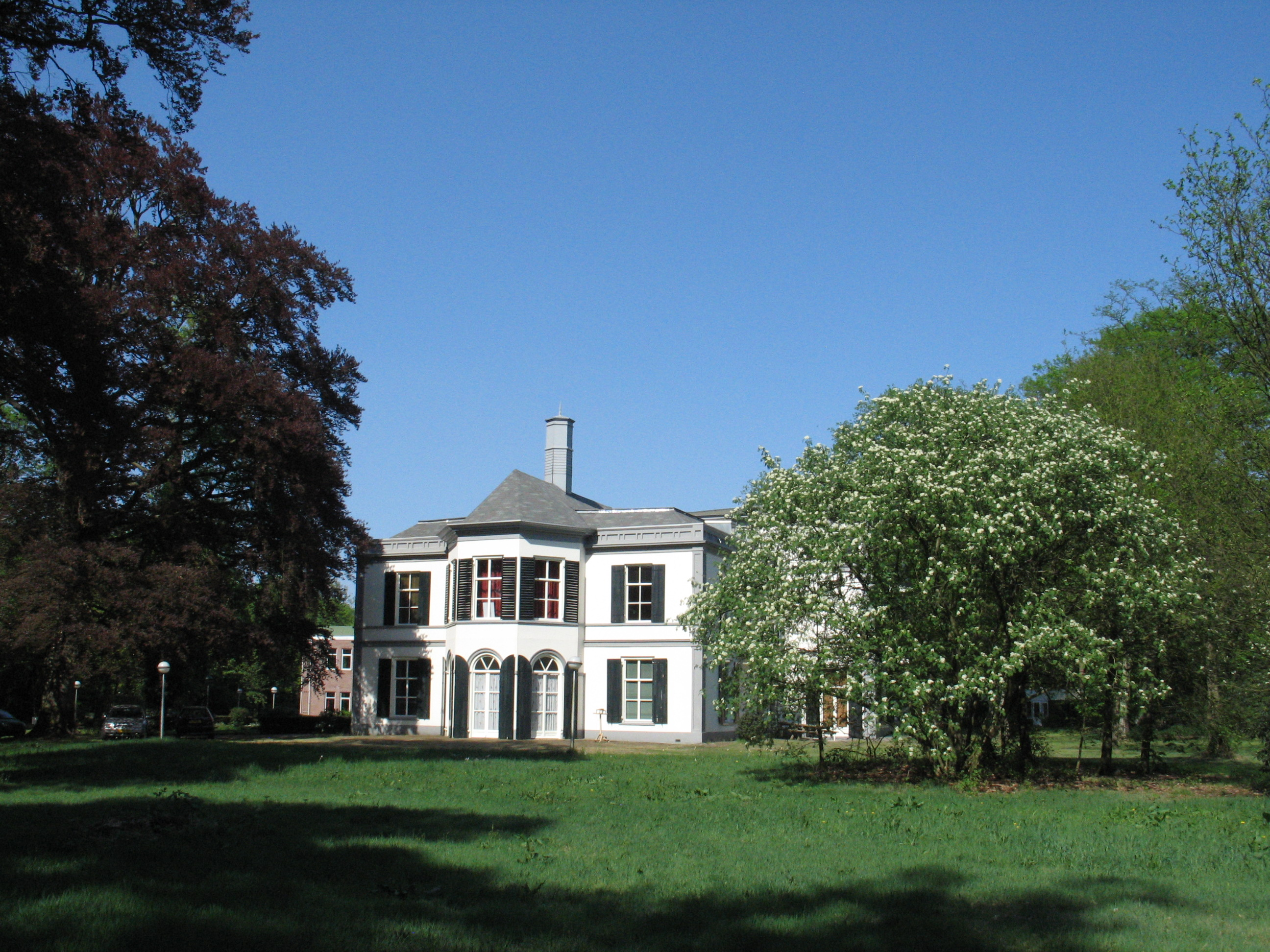 Rijksmonument De Keijenberg aan de Nieuwe Keijenbergseweg 171